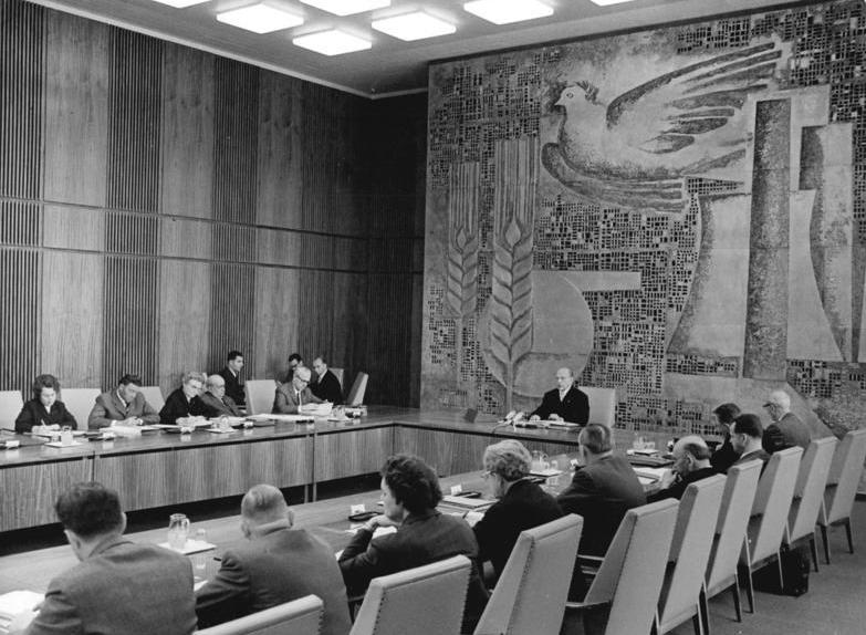 Zentralbild Junge 20.9.1968 Bgm-zie Berlin: 11. Sitzung des Staatsrates der DDR am 20.9.68. Der Staatsrat der DDR trat am 20.9.68 unter Vorsitz von Walter Ulbricht zu seiner 11. Sitzung zusammen. Im Mittelpunkt der Beratung im Amtssitz des Staatsrates am Marx-Engels-Platz steht ein Beschlußentwurf über "Die Aufgaben der Körperkultur und des Sports bei der Gesatlung des entwickelten gesellschaftlichen Systems des Sozialismus in der DDR". Auf unserem Foto: Blick auf einen Teil der Mitglieder des Staatsrates während der Eröffnungsansprache durch den Vorsitzenden des Staatsrates, Walter Ulbricht.